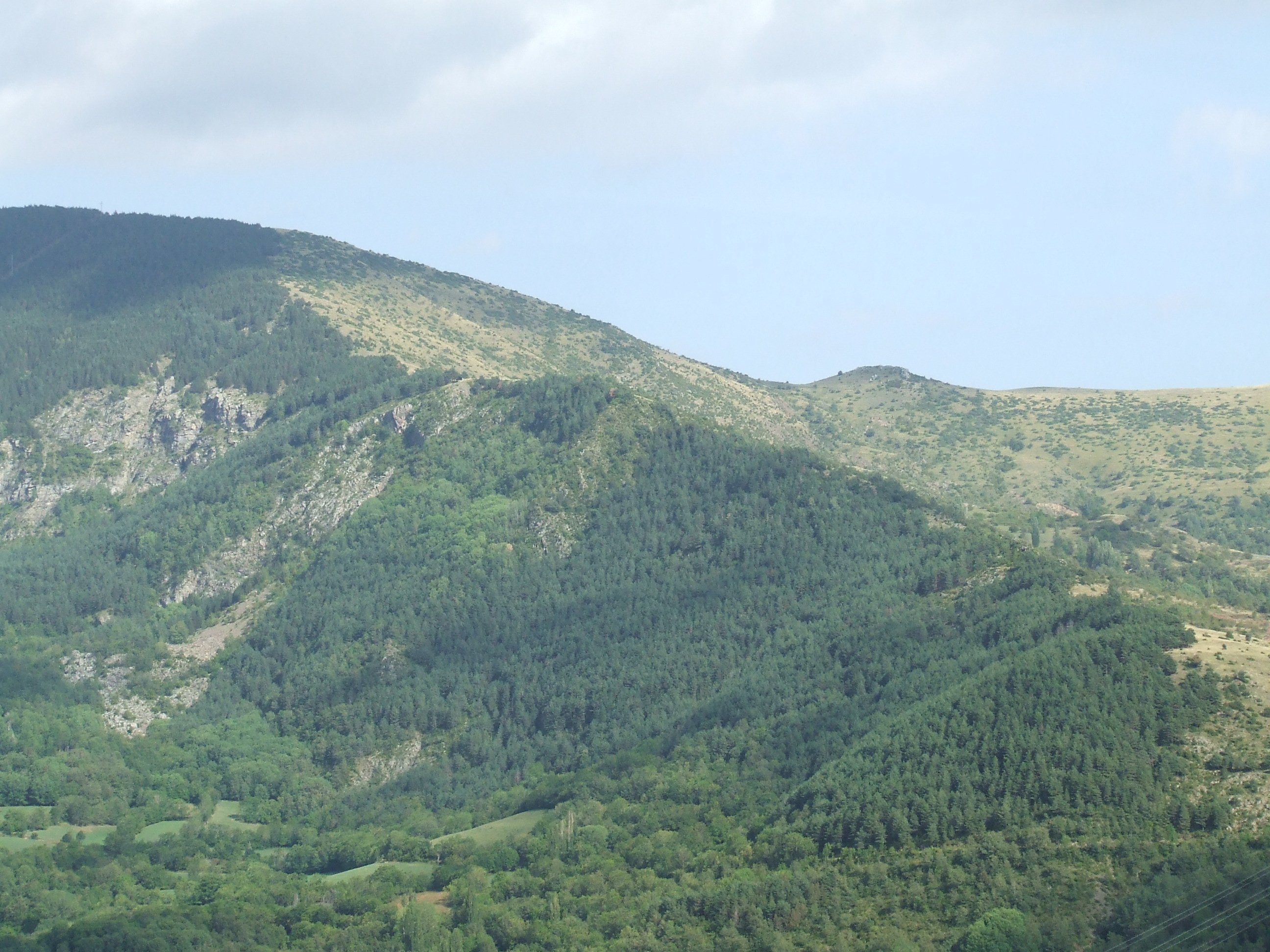 Serrat de les Marrades (Mont-ros, la Torre de Cabdella, Pallars Jussà)